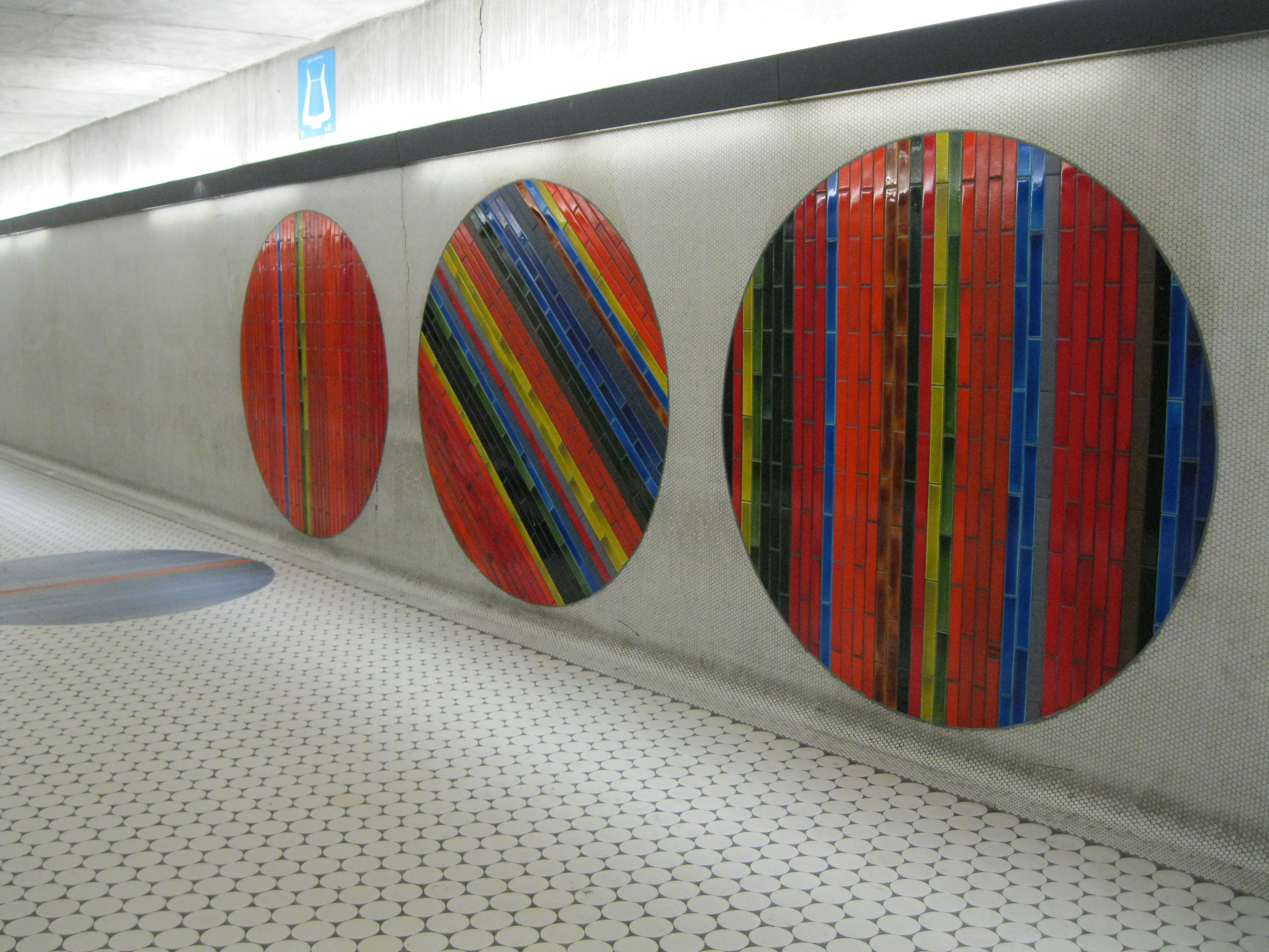 À Montréal, dans la station de métro Peel, l'artiste Jean-Paul Mousseau a créé 37 cercles que l'on retrouve un peu partout - info